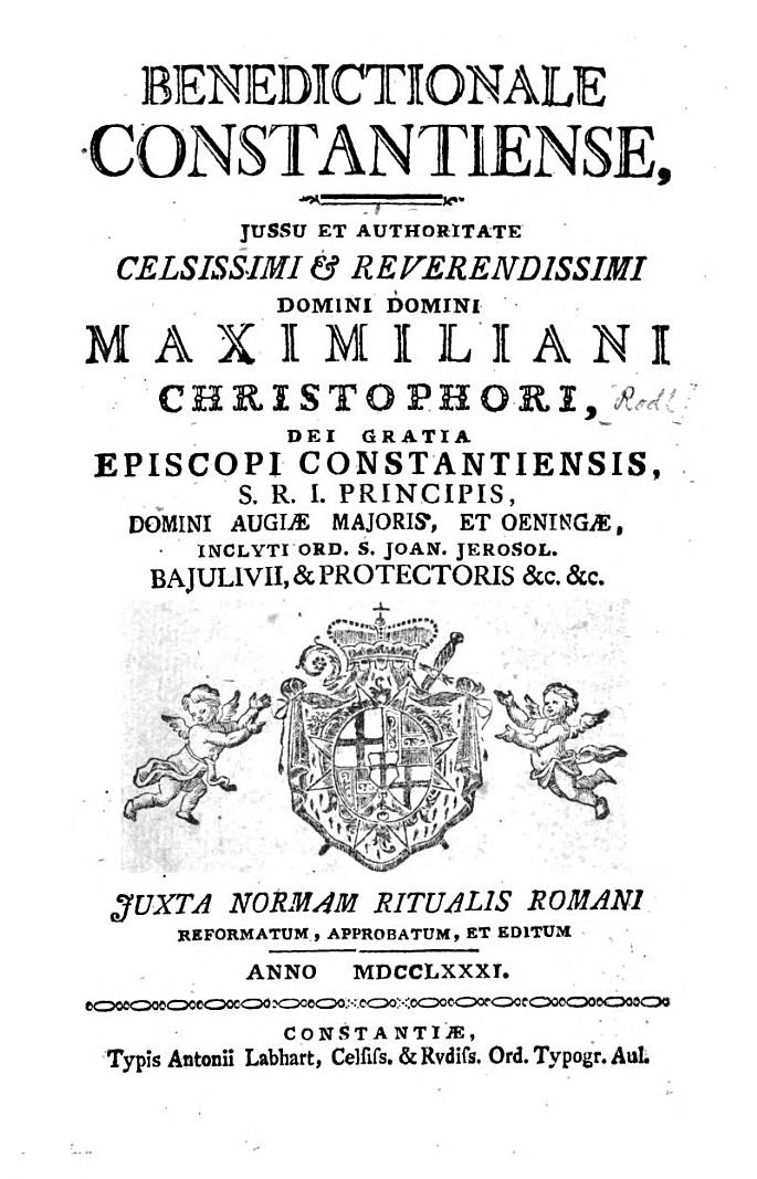 Titelblatt des Buchs Benedictionale Constantiense, Jussu et Authoritate Celsissimi & Reverendissimi Domini Domini Maximiliani Christophori, Dei Gratia Episcopi Constantiensis von Bischof Maximilian Christohp von Rodt, Konstanz 1781